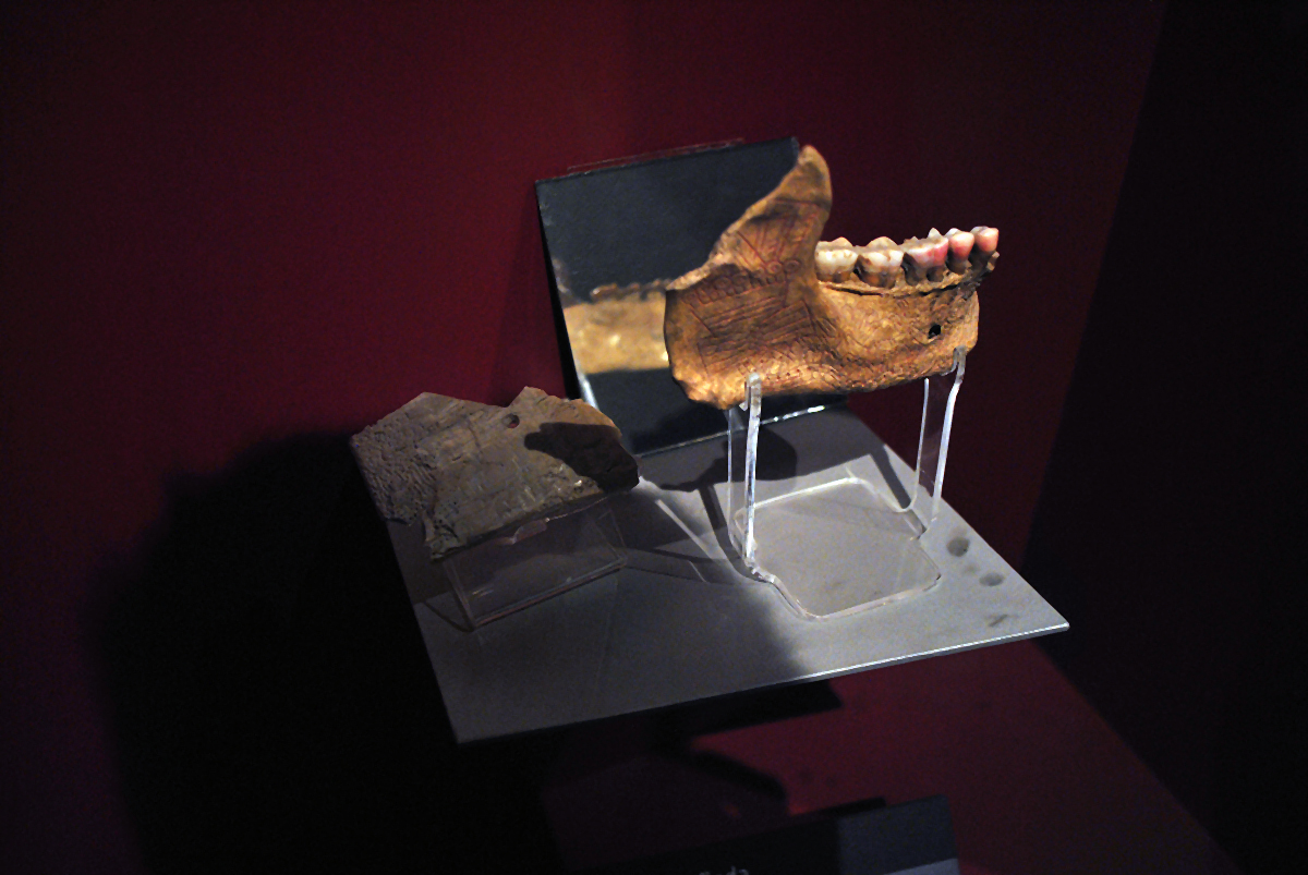 Mandíbula esgrafiada. Museo de Sitio del Centro Cultural de España en México